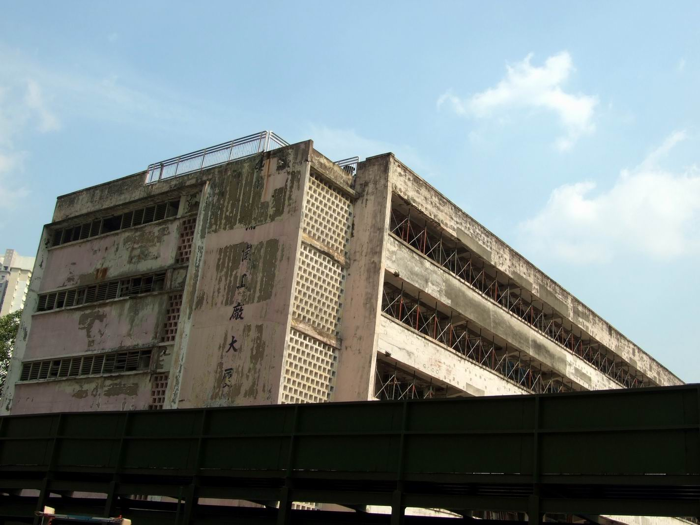 新蒲崗工廠大廈第四座